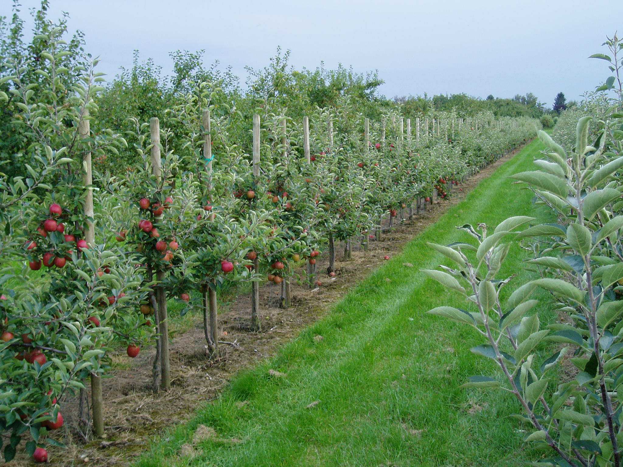 Obstplantage im Alten Land